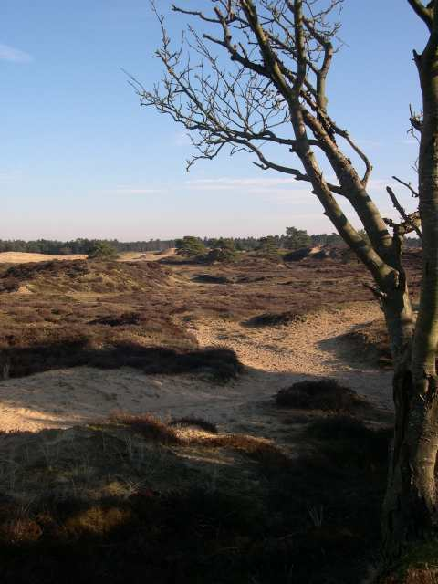 Aekingerzand, foto 5 februari 2005, Jan Nijman